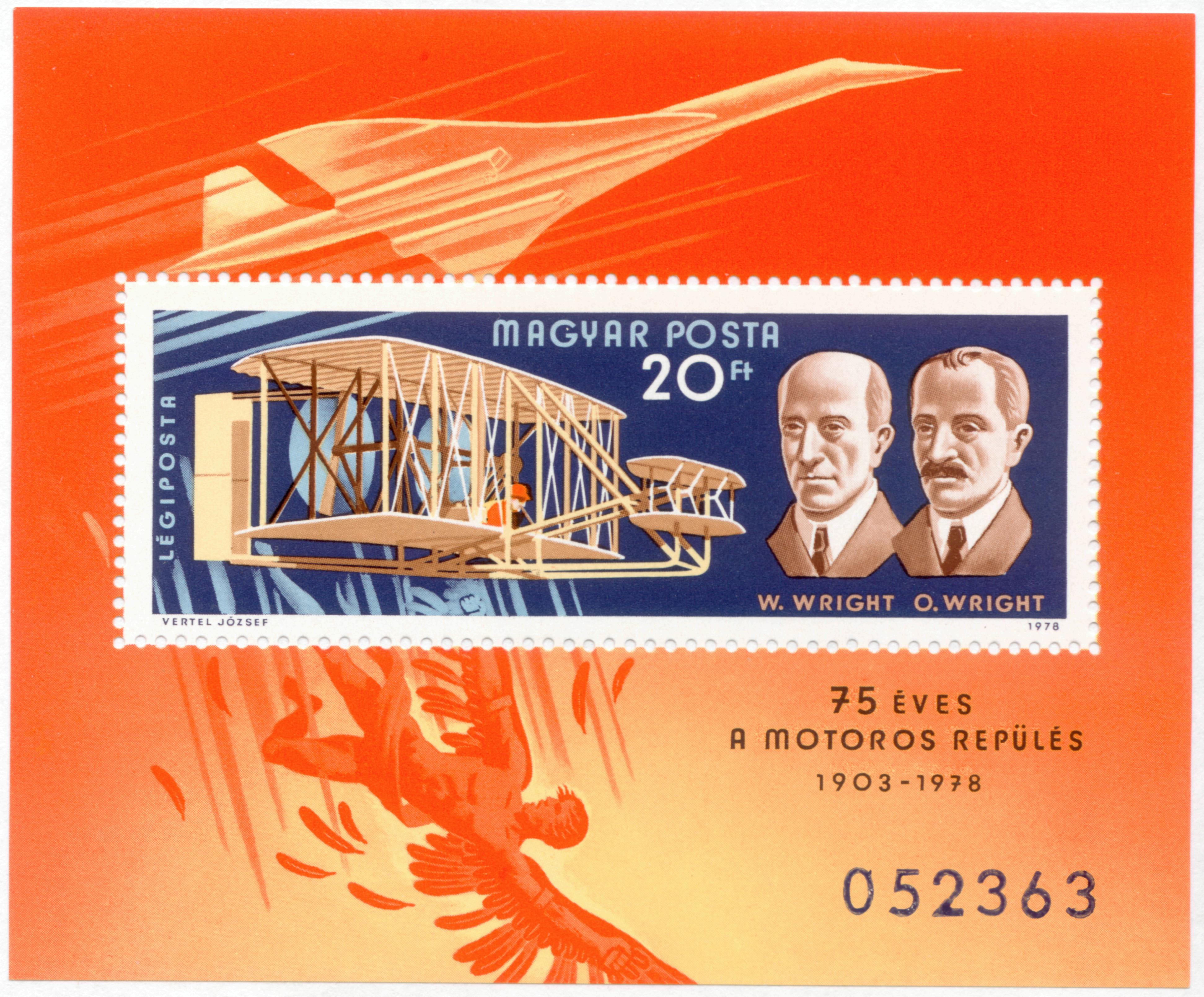 75 лет полёту братьев Райт. Венгерский номерной почтовый блок 1978 года. Вверху силуэт реактивного сверхзвукового Ту-144, внизу силуэт падающего Икара, на марке первый самолёт братьев Райт и их портрет.